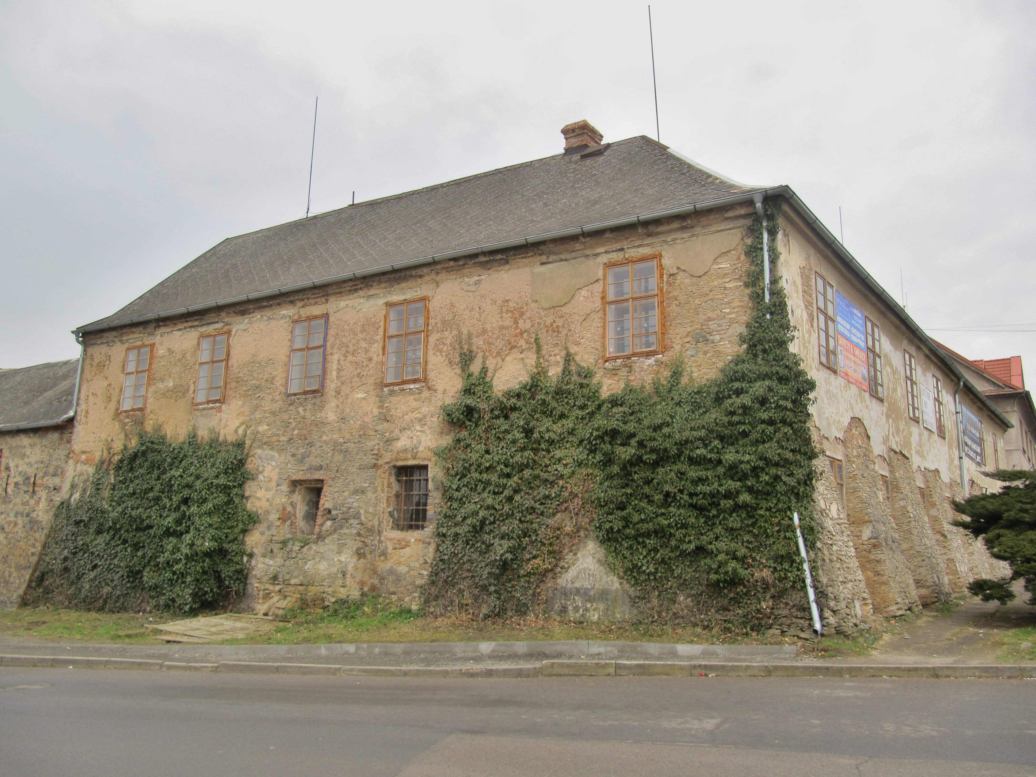 Tvrz (Odolena Voda), na návsi 1, Odolena Voda